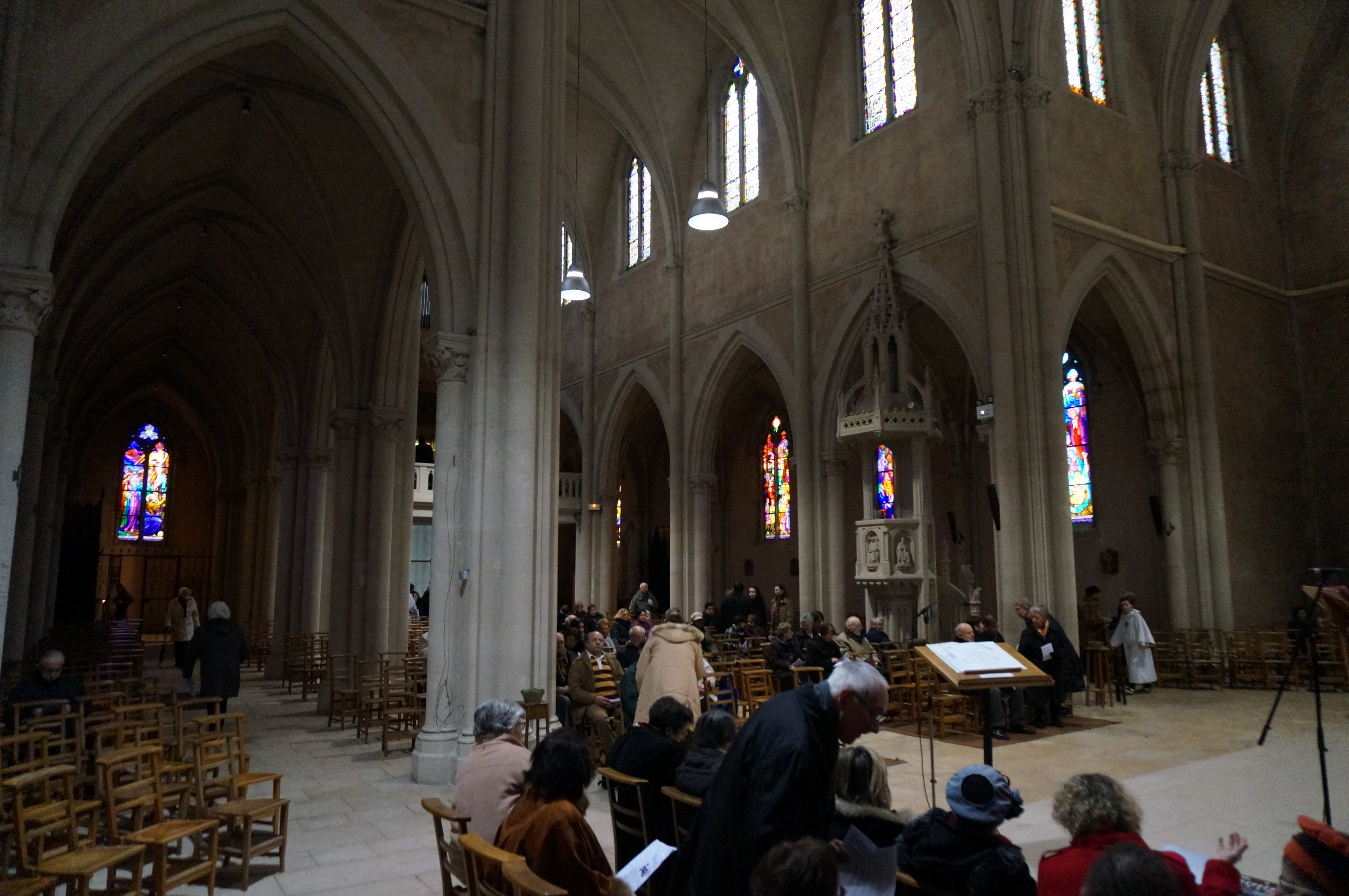 Vue de la chaire de l'Église st-Fiacre, travail sur un dessin de Prosper Morey.